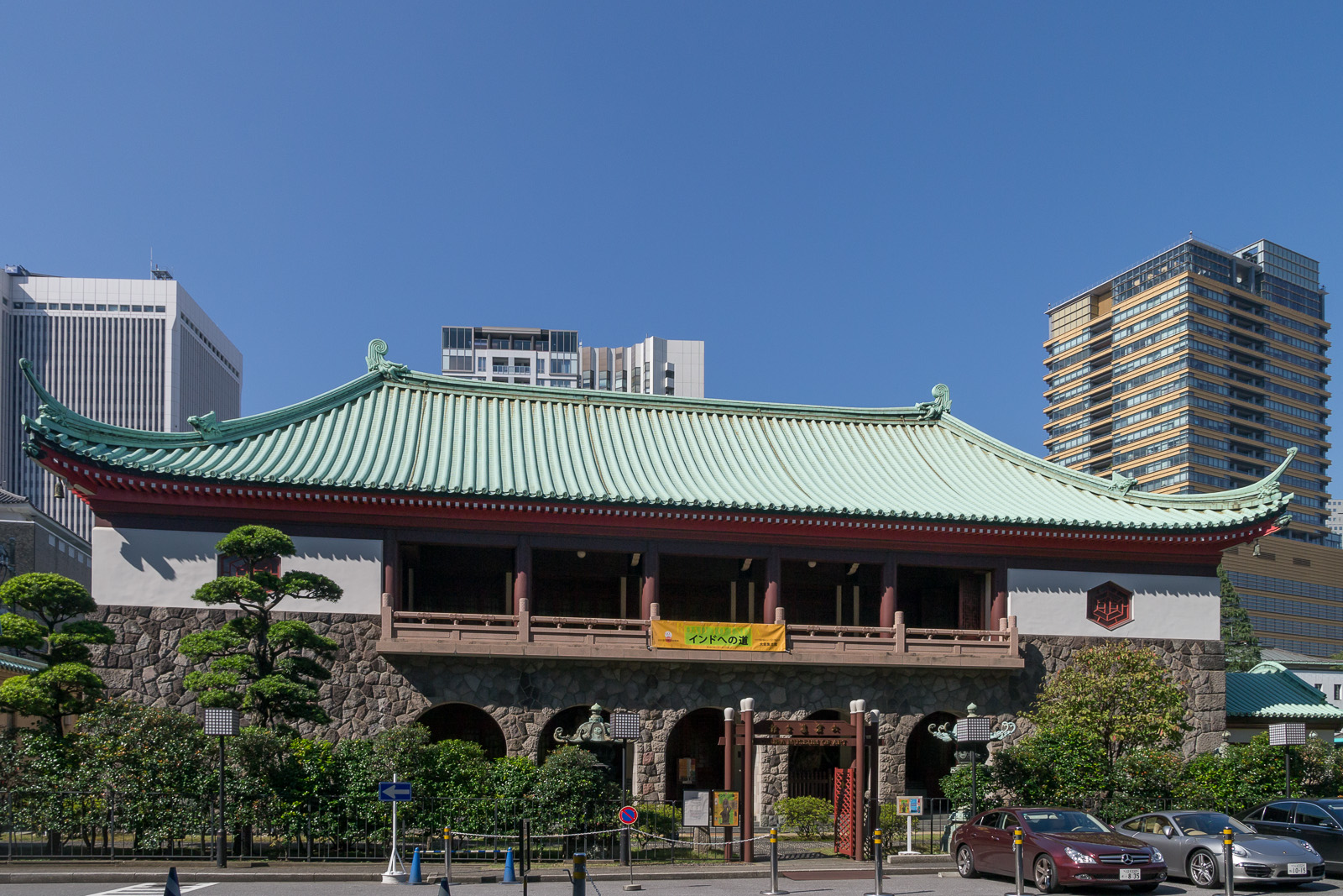 大倉集古館、東京都港区虎ノ門。